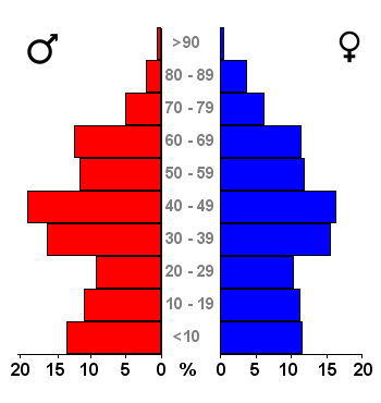 Age pyramids for the 443 municipalities in the Netherlands. Data 2007. Statistics provided by Centraal Bureau voor de Statistiek, Voorburg/Heerlen. Source: Tabel: Bevolking Nederland per gemeente en diverse regio's naar leeftijd, geslacht en burgerlijke staat, 1 januari 1988-2007. Gewijzigd op 24 mei 2007 (on-line database StatLine) Bevolkingspiramide - Gemeente Vlieland (2007).png